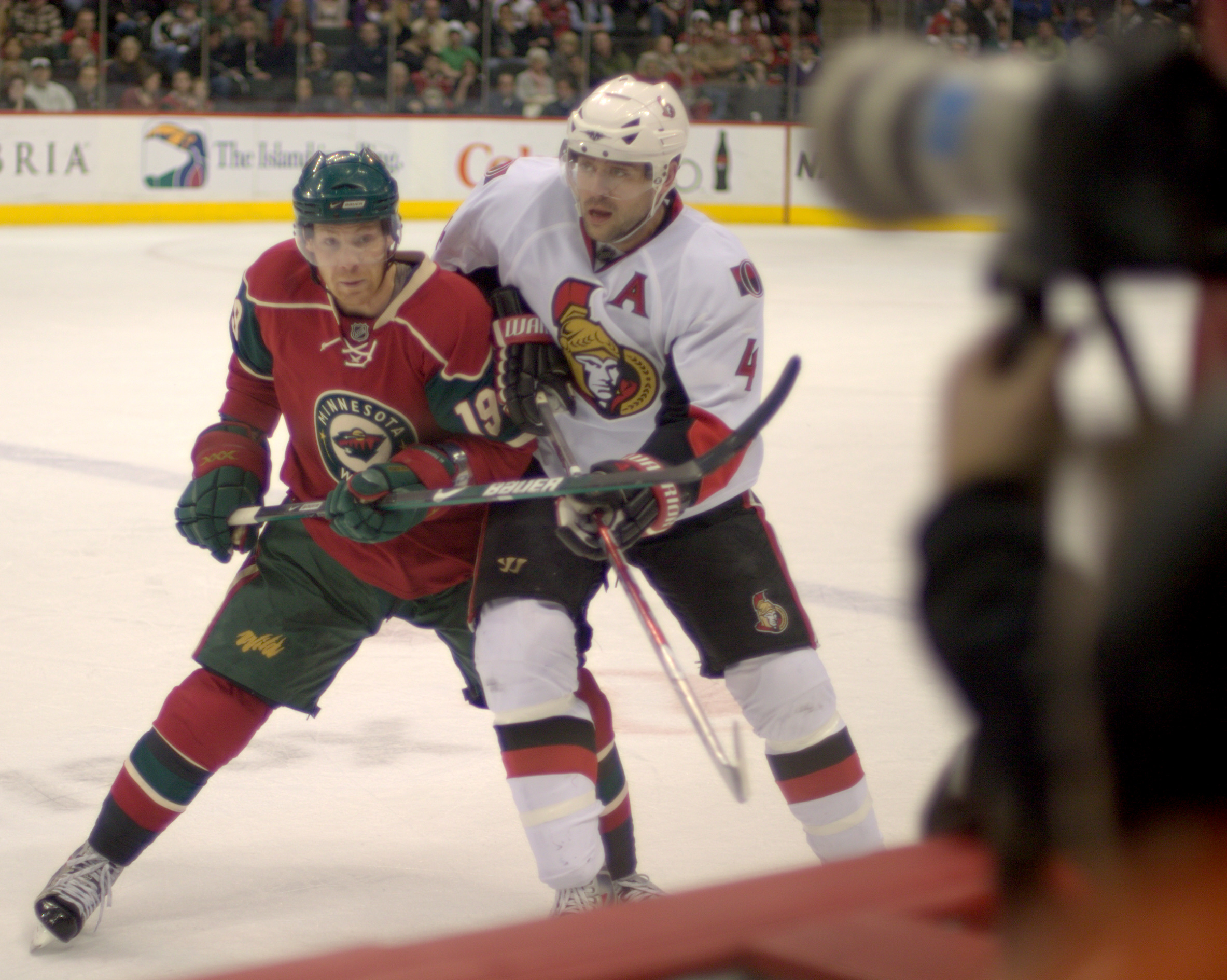 Stephane Veilleux vs Chris Phillips